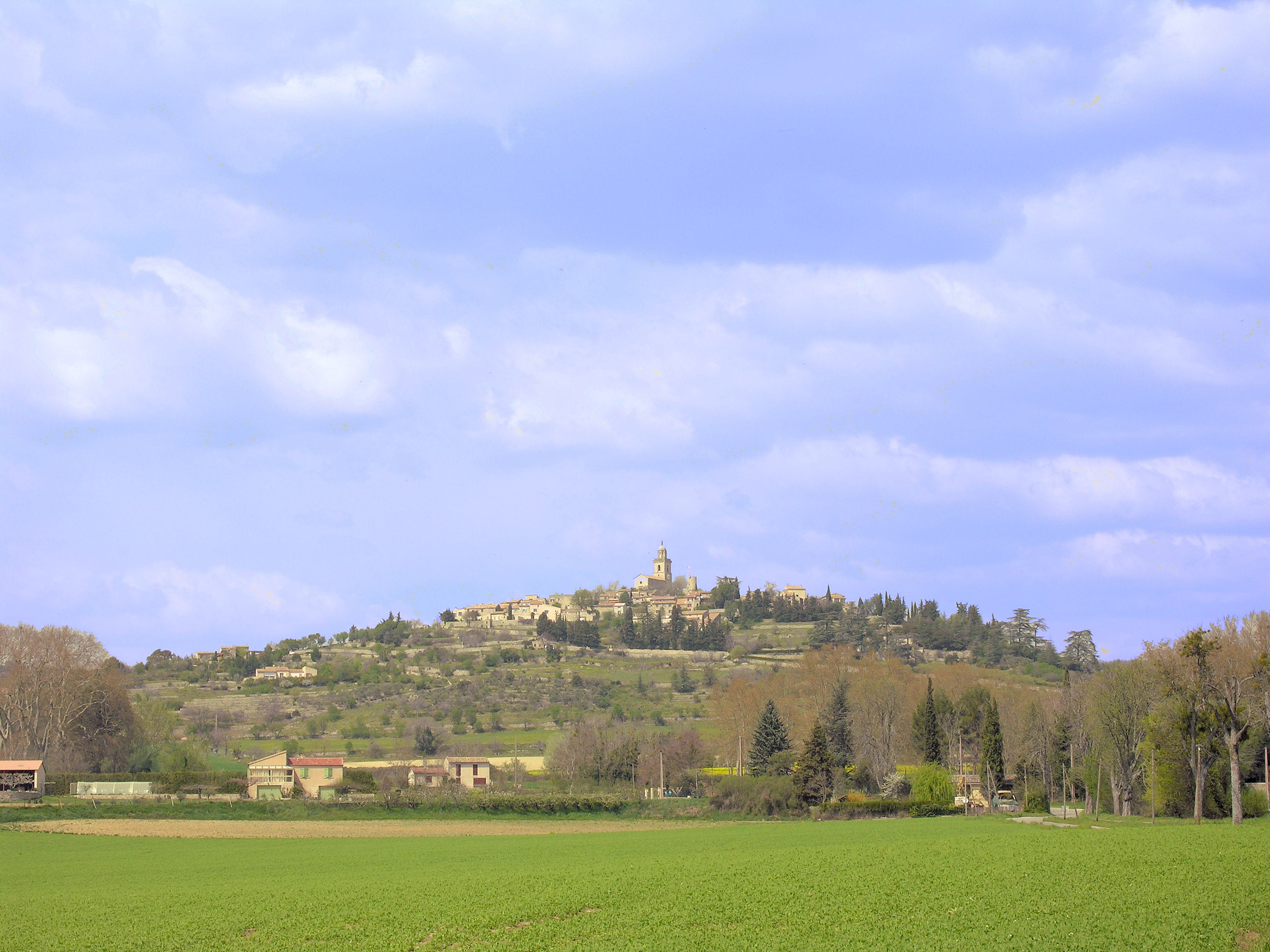 Le village perché de Reillanne